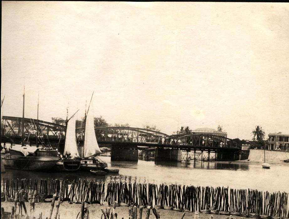 Ponte sôbre o Chiveve